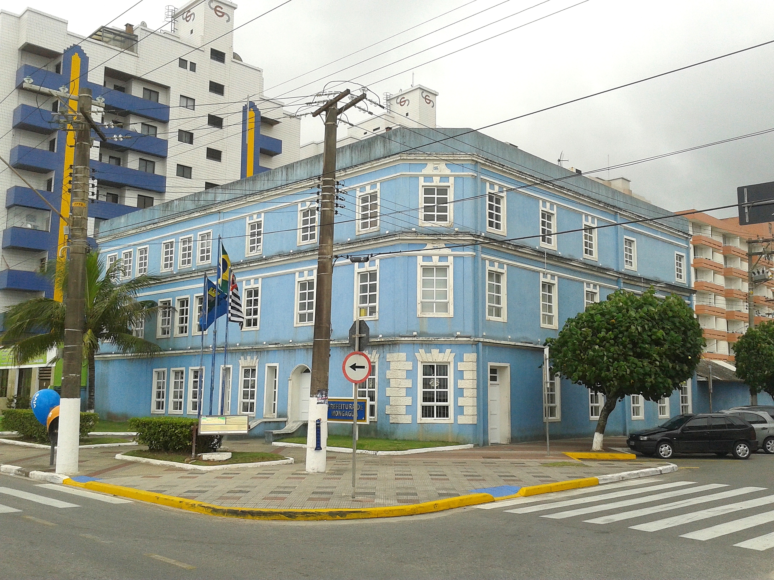 Sede da Prefeitura de Mongaguá, SP, no centro da cidade.